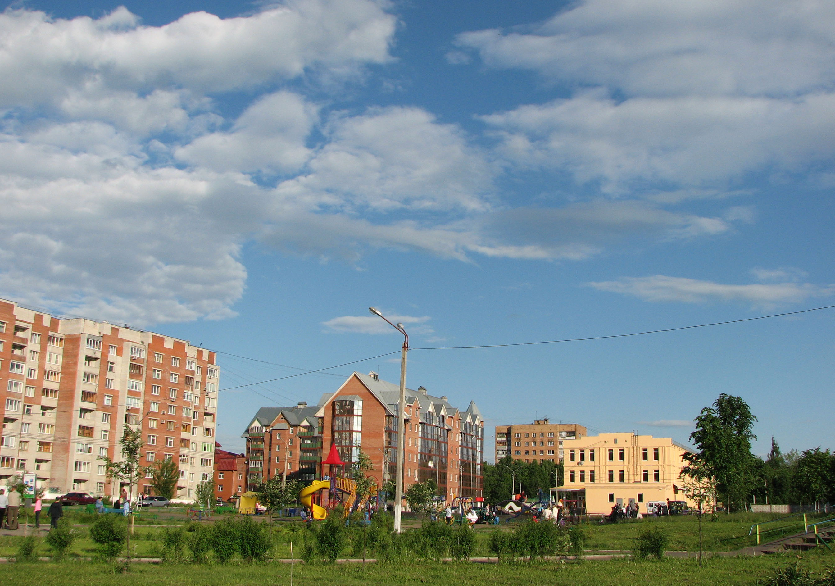 Железногорск.Курская область.